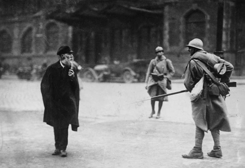 Ruhrbesetzung Mit gefälltem Bajonett gegen einen Greis. Diese Aufnahme wurde im Jahre 1923 also "mitten im Frieden" in einer Stadt an der Ruhr gemacht. Mit brutalster Gewalt gingen damals die Franzosen gegen die wehr- und waffenlose Zivilbevölkerung vor. Sie schonten niemanden, der ihnen nicht zu Willen war.